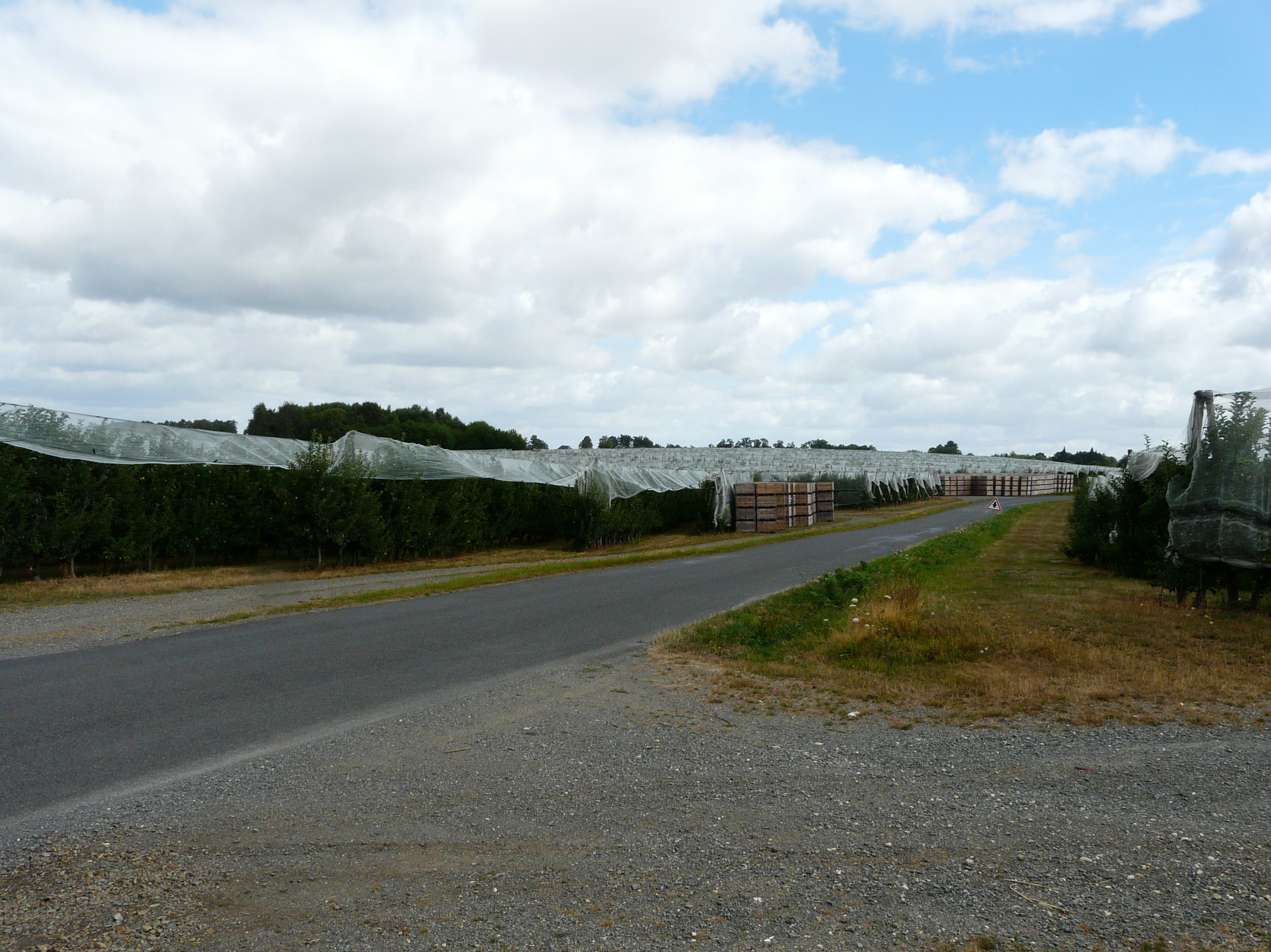 Entre les plantations de pommiers, près du lieu-dit les Bichets, la route départementale 5E3 marque la limite entre Saint-Cyr-les-Champagnes (Dordogne) à gauche et Juillac (Corrèze) à droite.